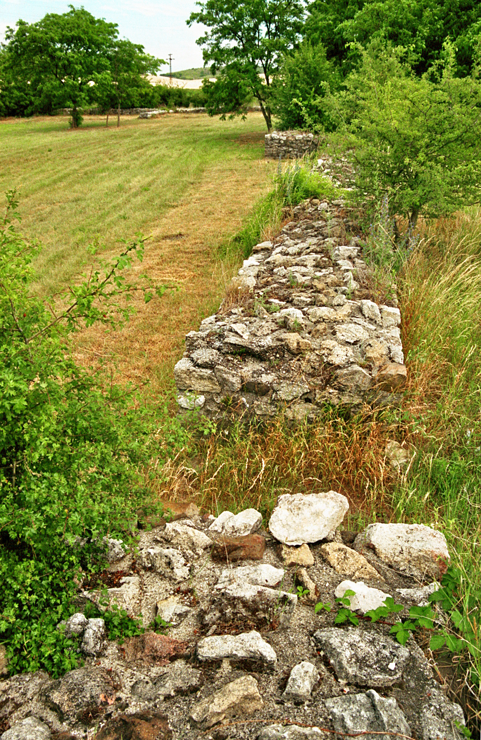 Kastell Tokod, Ungarn: südwestliche Schlupfpforte. This is a photo of a monument in Hungary, Identifier: 6487